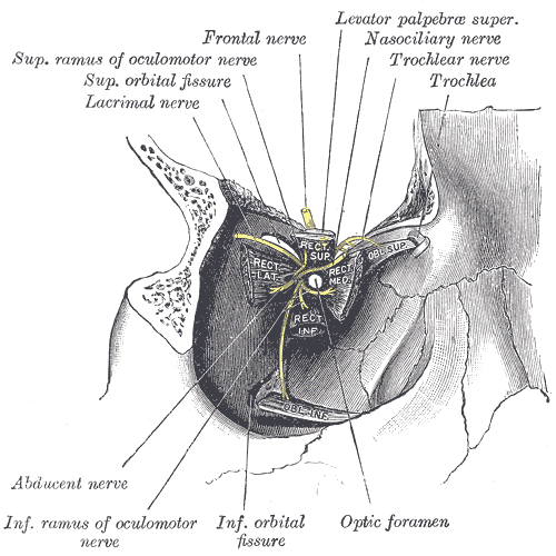 Blick in die rechte Orbita von vorne nach Entfernen des Bulbus und der vorderen Anteile der anderen Strukturen.